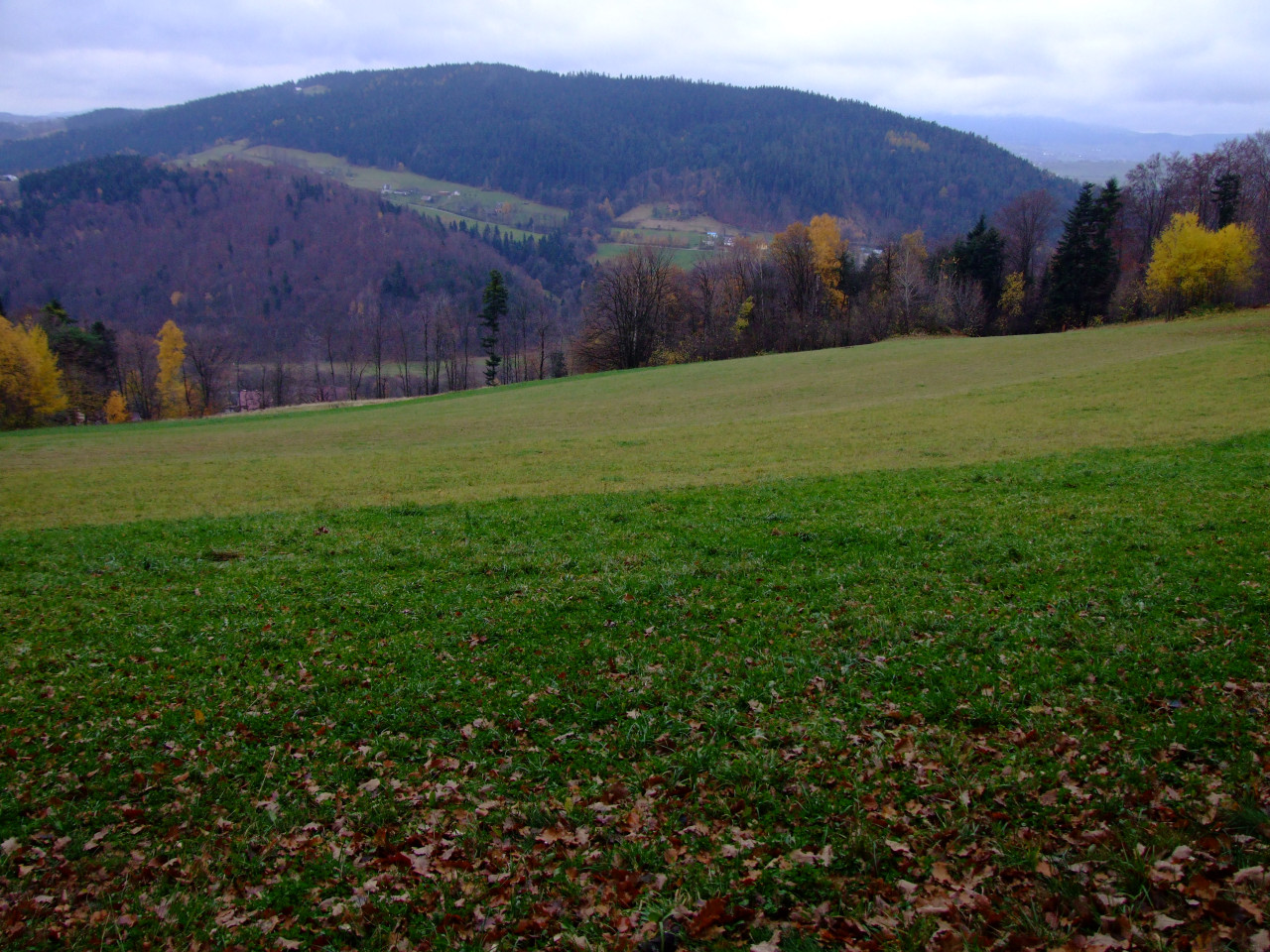 Paproć- widok z Zęzowa (Beskid Wyspowy)